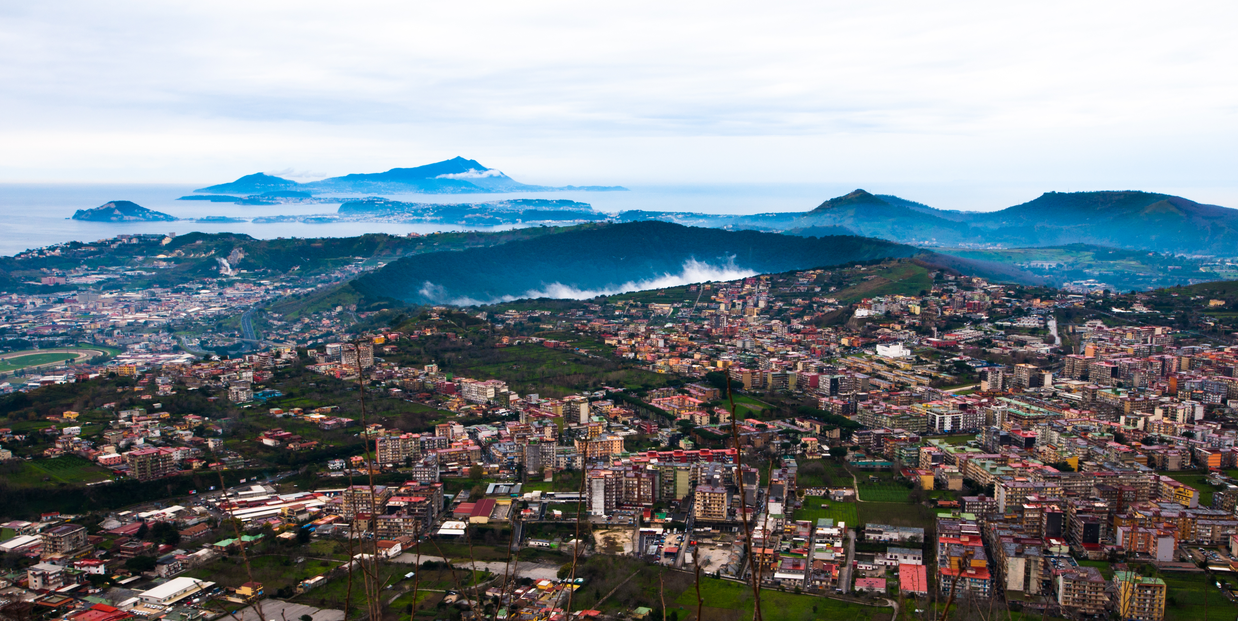 Cratere degli Astroni This is a photo of a monument which is part of cultural heritage of Italy. The authorisation for taking photos of this object was provided by the World Wide Fund for Nature Italy.